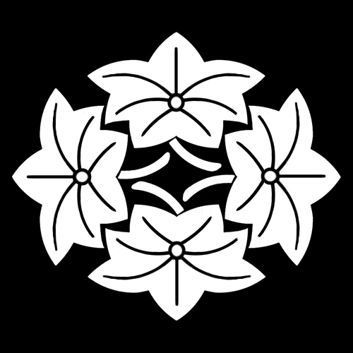 「四つ紅葉」紋（染抜）